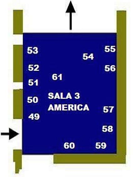 Distribució de las obras de la sala 3, dedicada a Amética.